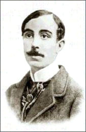 António Nobre (1867-1900) a Portuguese poet.